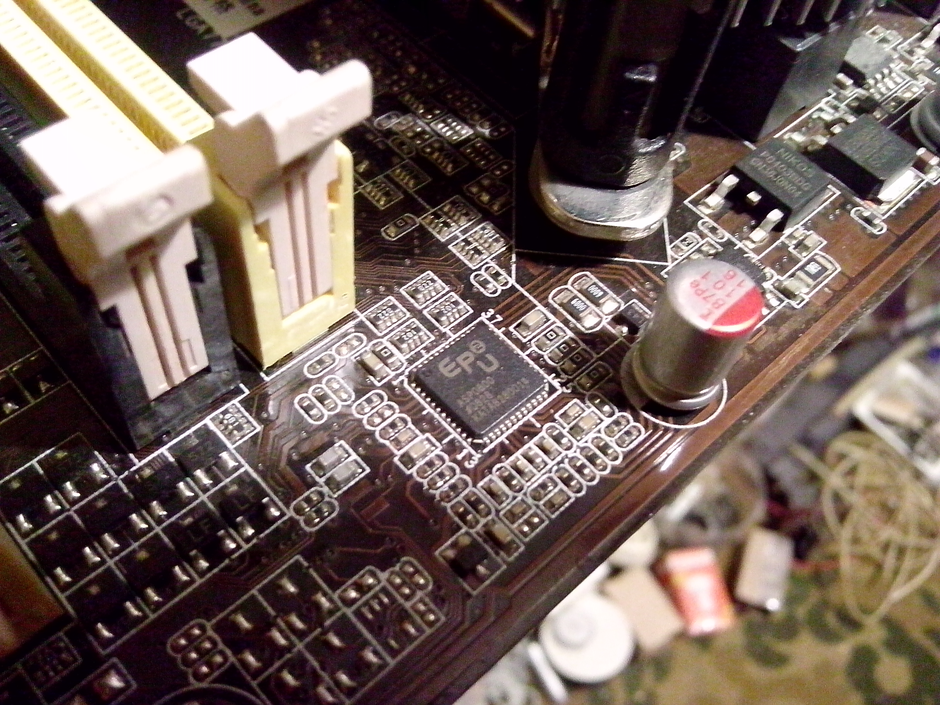 Материнская плата ASUS P5Q SE